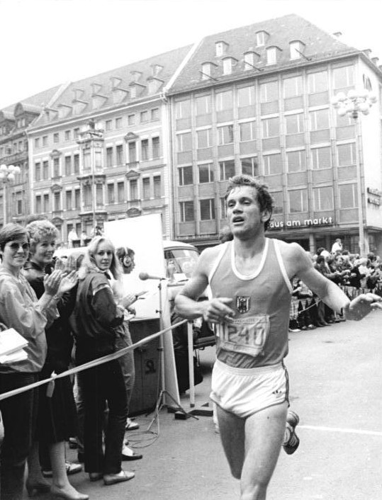 Leipzig, KMU-Marathon, Jörg Peter ADN-ZB Kluge 22.6.85-wo-Leipzig: DDR-Meister im Marathonlauf wurde Jörg Peter (SC Einheit Dresden). Die Meisterschaft wurde im Rahmen des KMU-Marathons ausgetragen, an dem sich 821 Läuferinnen und Läufer beteiligten.